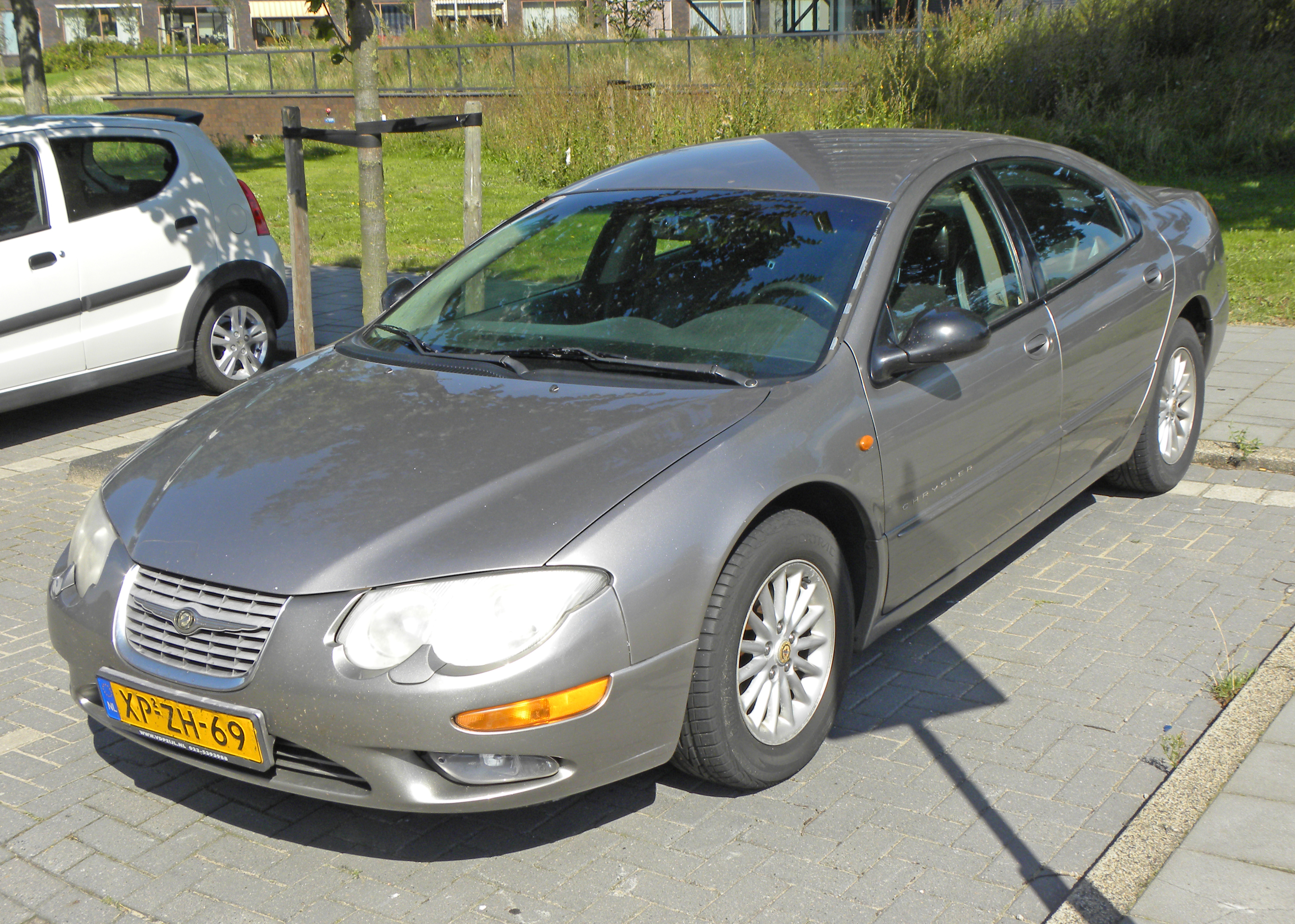 1999 Chrysler 300 M V 6